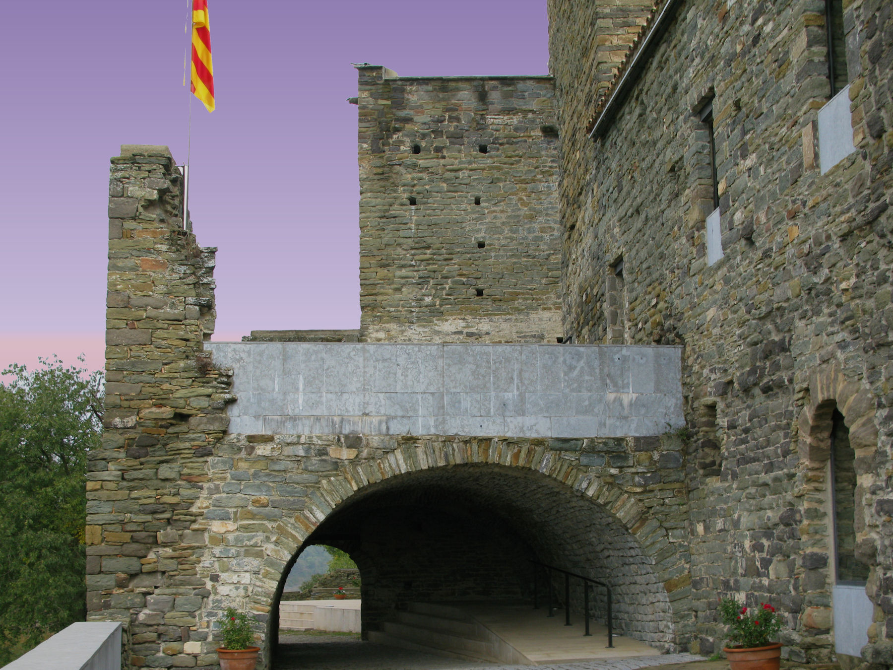 Castell de Casserres - Les Masies de Roda